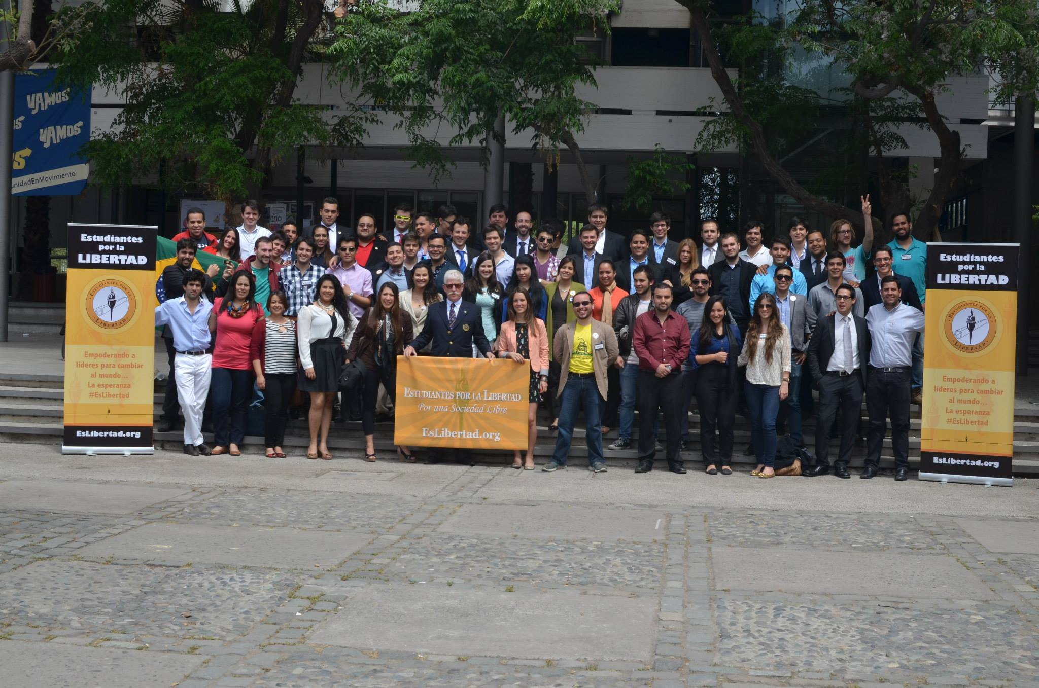 Foto oficial de la Primera Conferencia Latinoamericana de Estudiantes Por La Libertad, llevada a cabo en Chile durante el mes de octubre del año 2013.